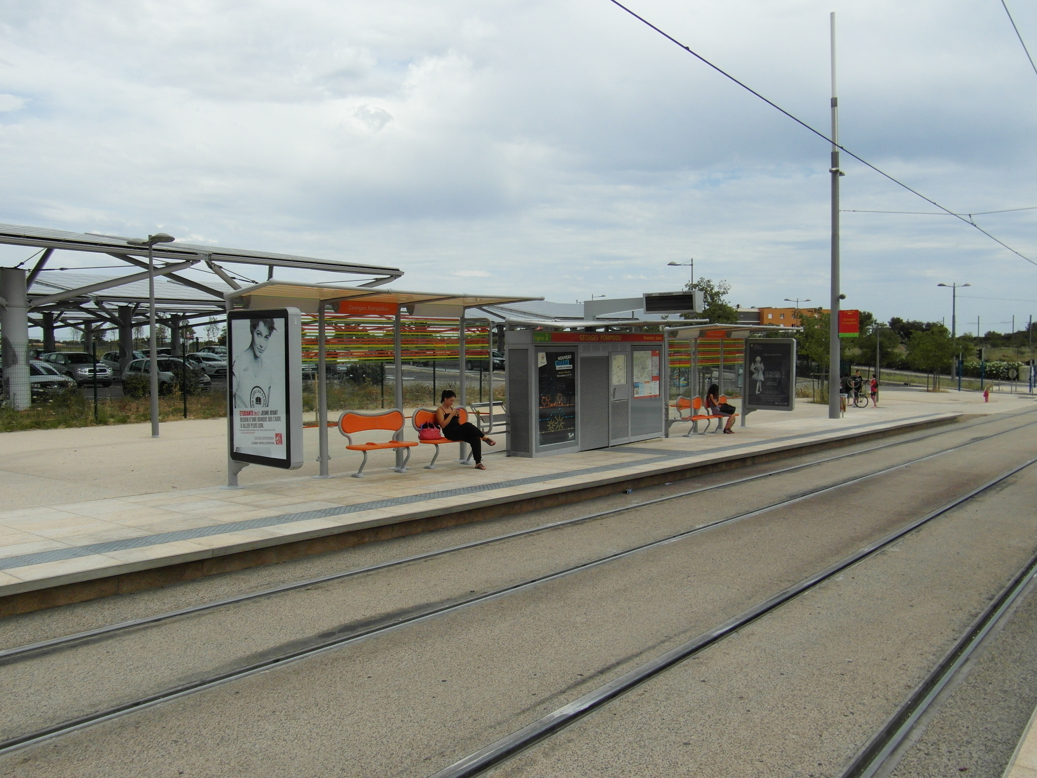 Montpellier - Tramway - Ligne 2 - Centre-Ville-Jacou